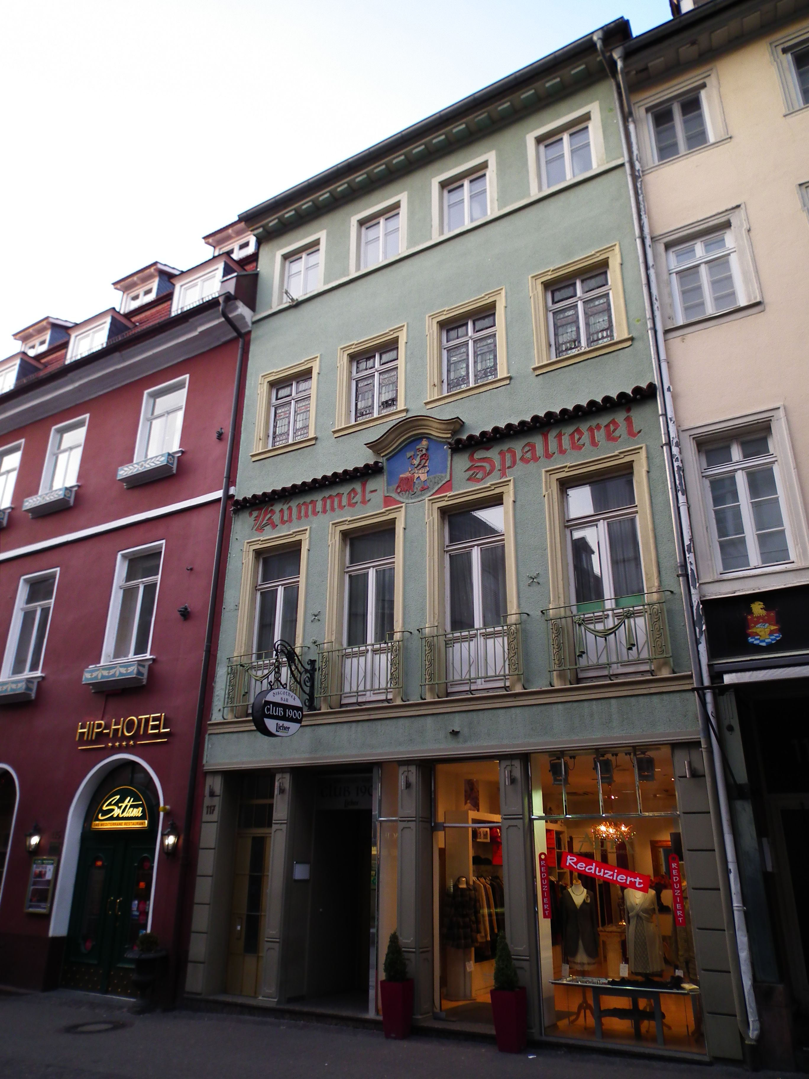 Kümmel-Spalterei an der Hauptstraße 117 in der Heidelberger Altstadt (Baden-Württemberg, Deutschland)